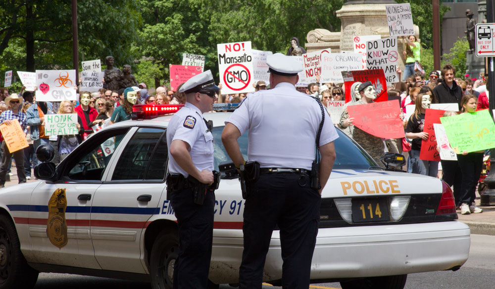 e